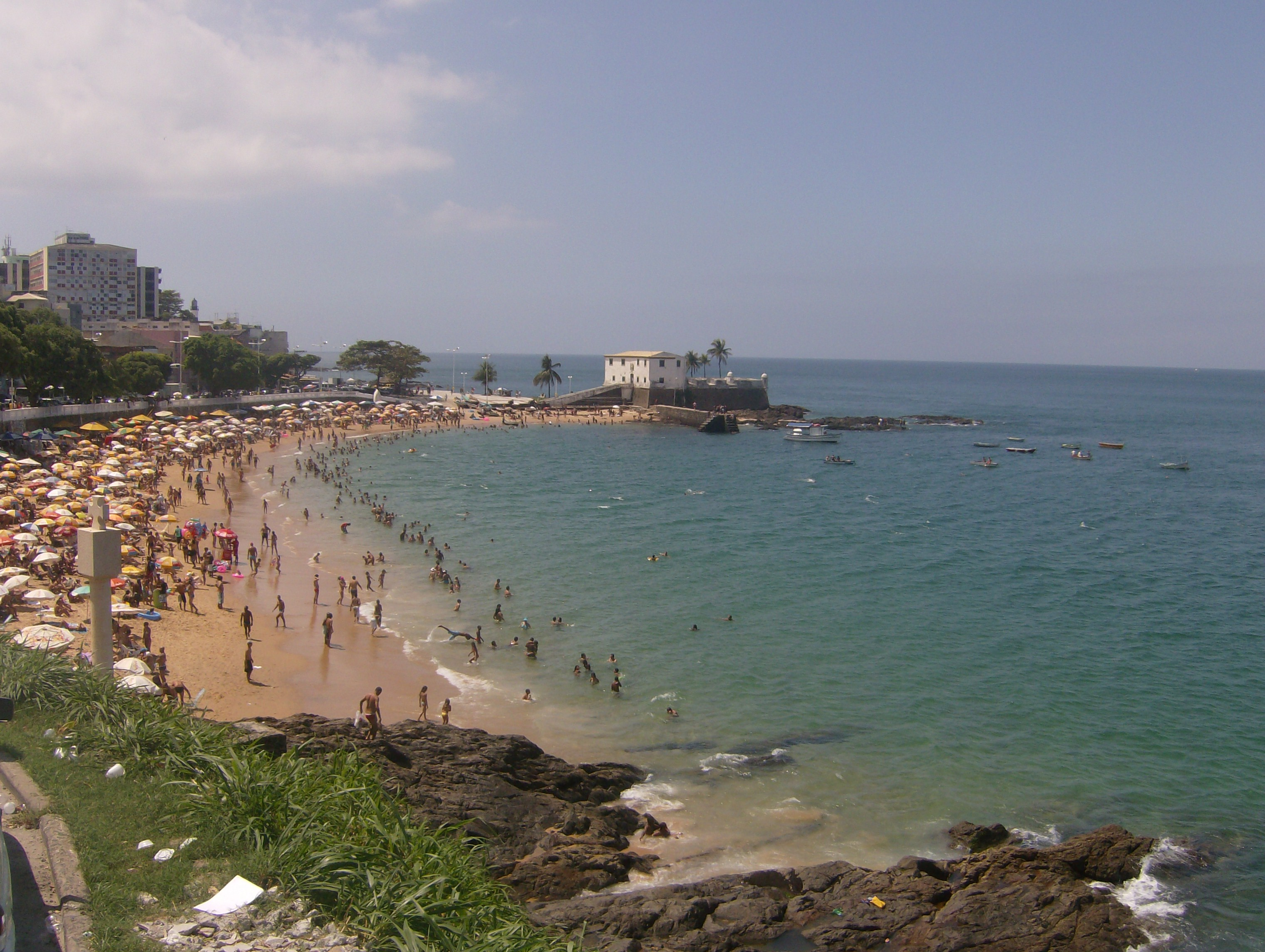 A Praia do Porto da Barra, Salvador, Bahia, Brasil.